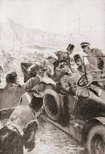 A Ferenc Ferdinánd elleni merénylet rajzon